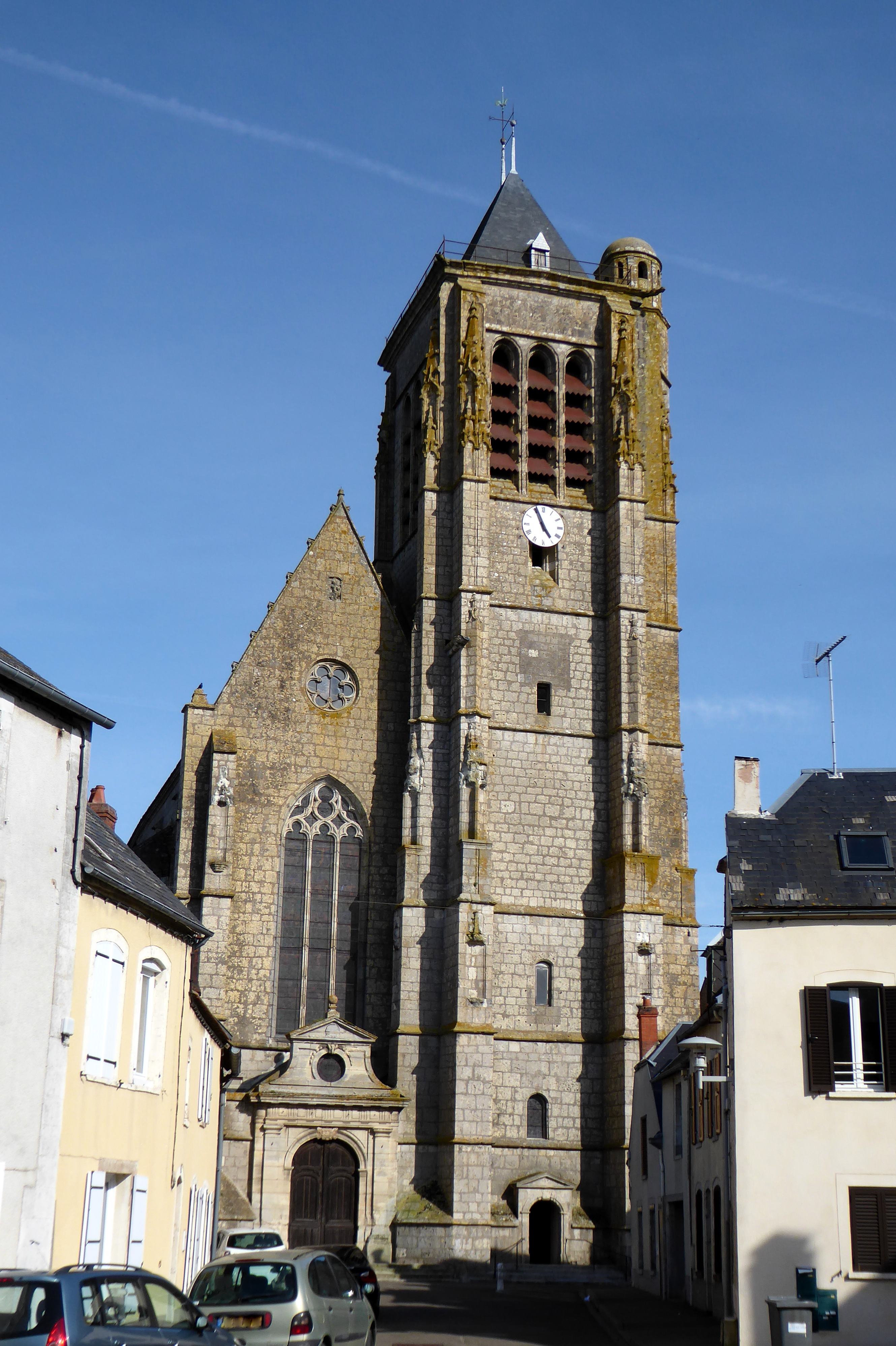 Place de l’Étape, église Saint-Étienne, Janville, Eure-et-Loir (France).